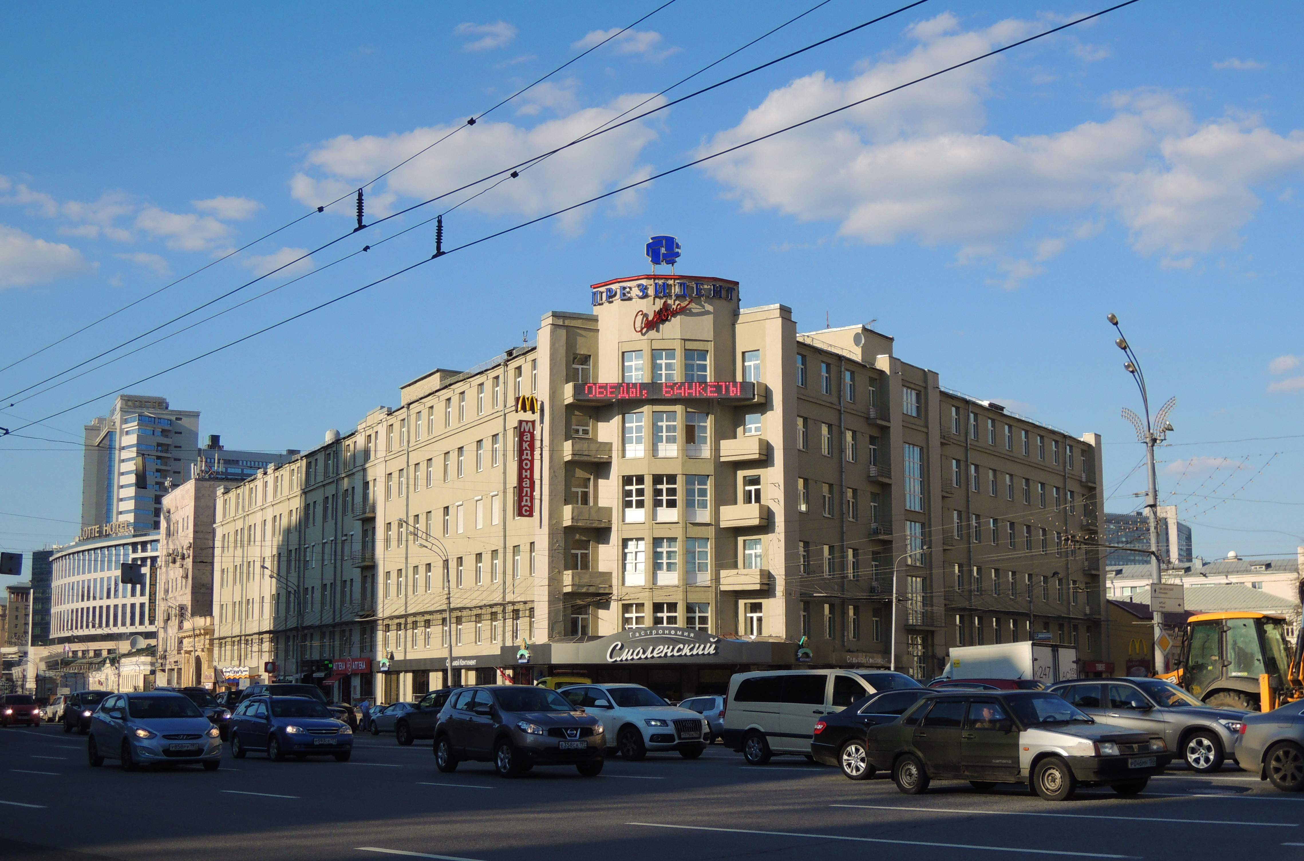 Смоленская площадь